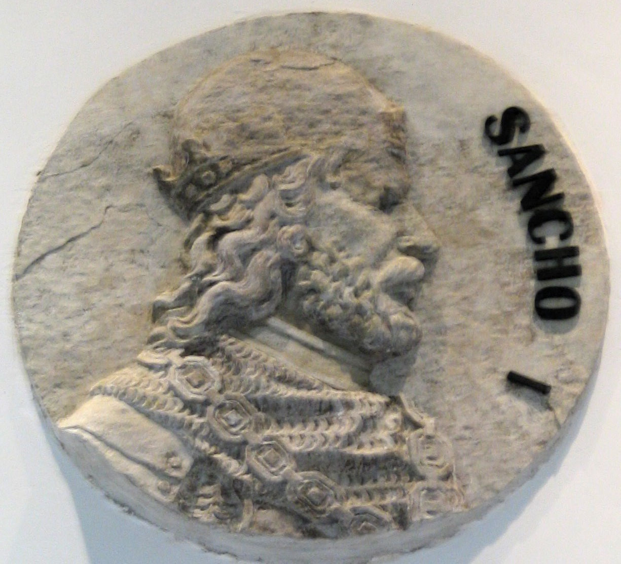 Medallón de Sancho I realizado por Antonio Palao en la Diputacion Provincial de Zaragoza